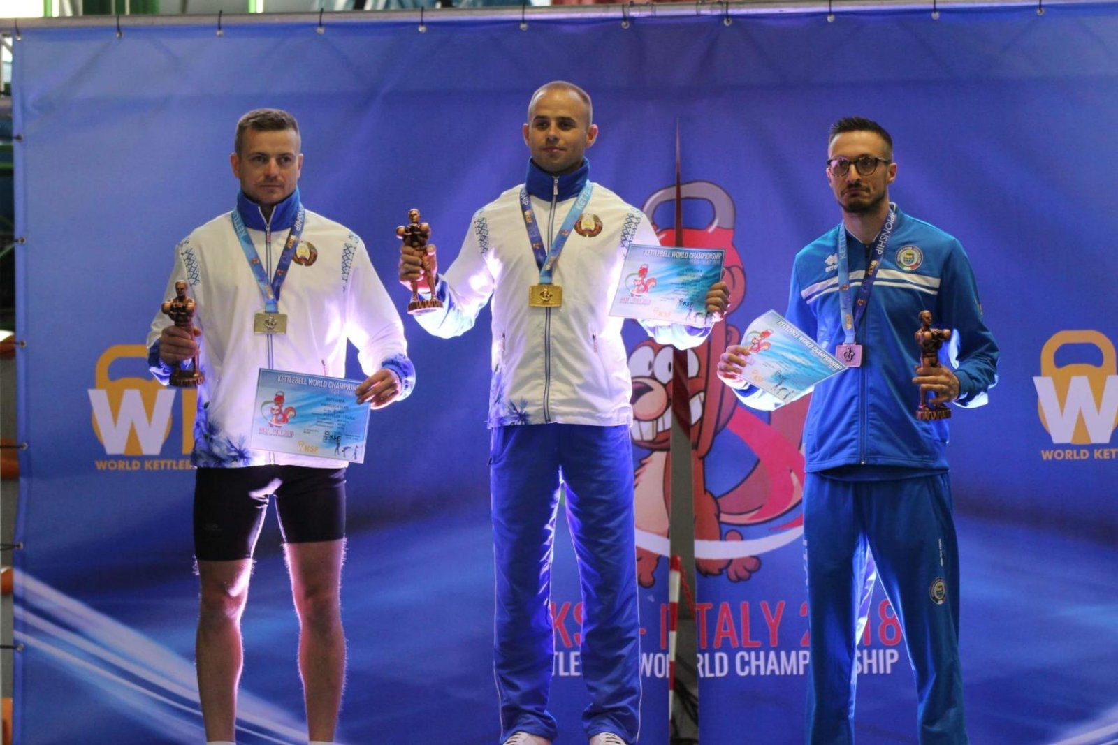 Награждение на чемпионате мира в Италии, 2018 год